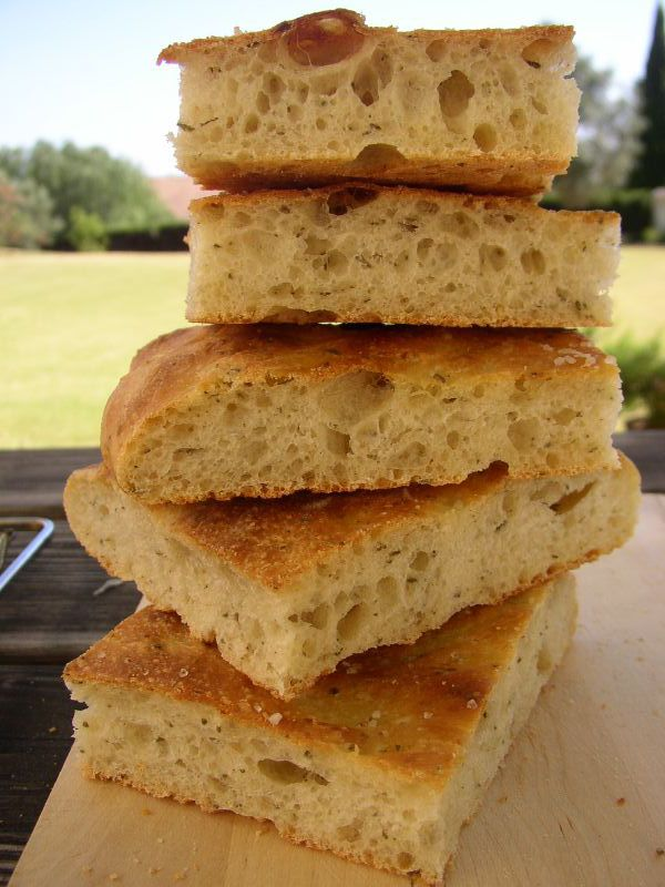 Focaccia fatta con patate e salvia.